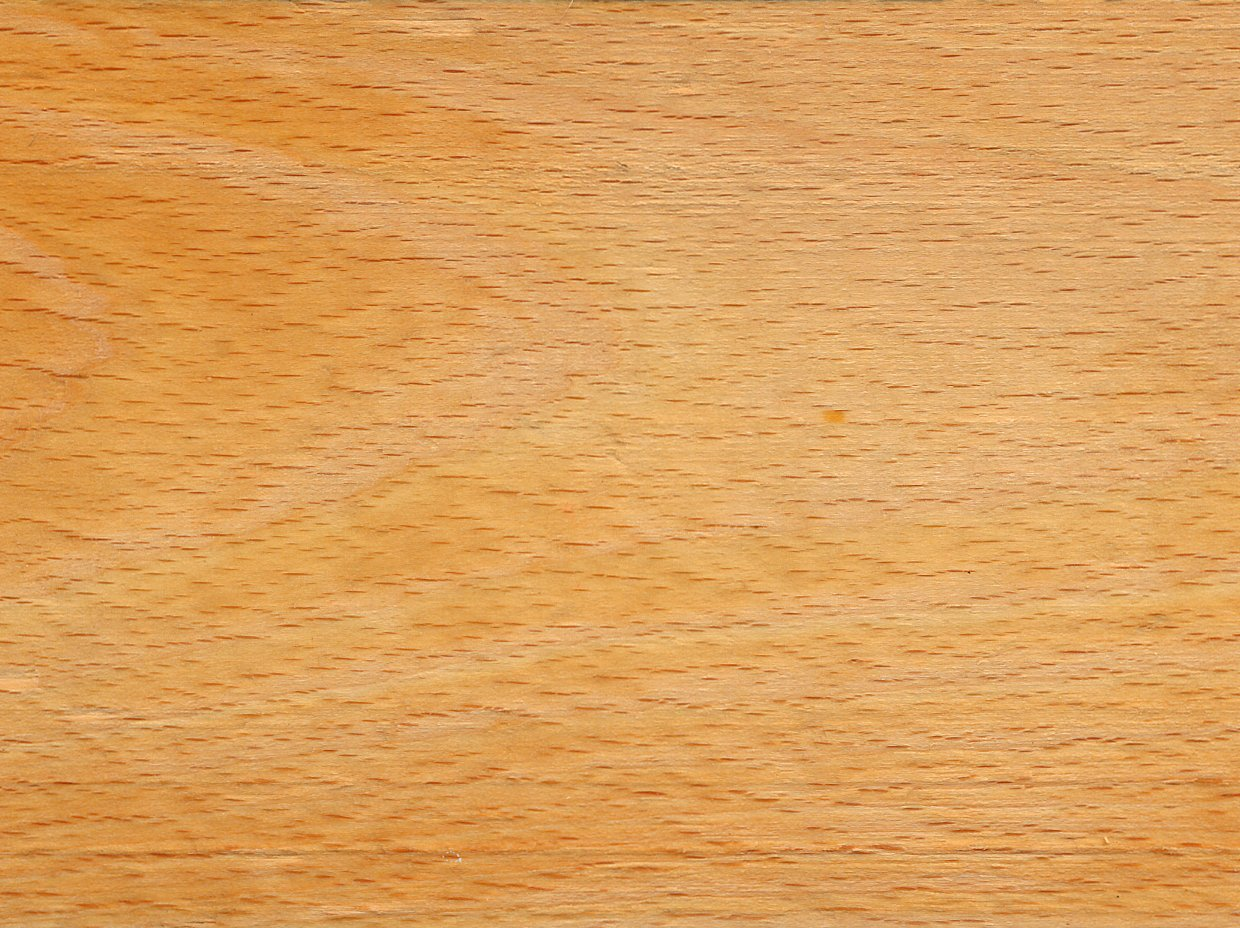 Fagus sylvatica, przekrój styczny przez drewno buka pospolitego